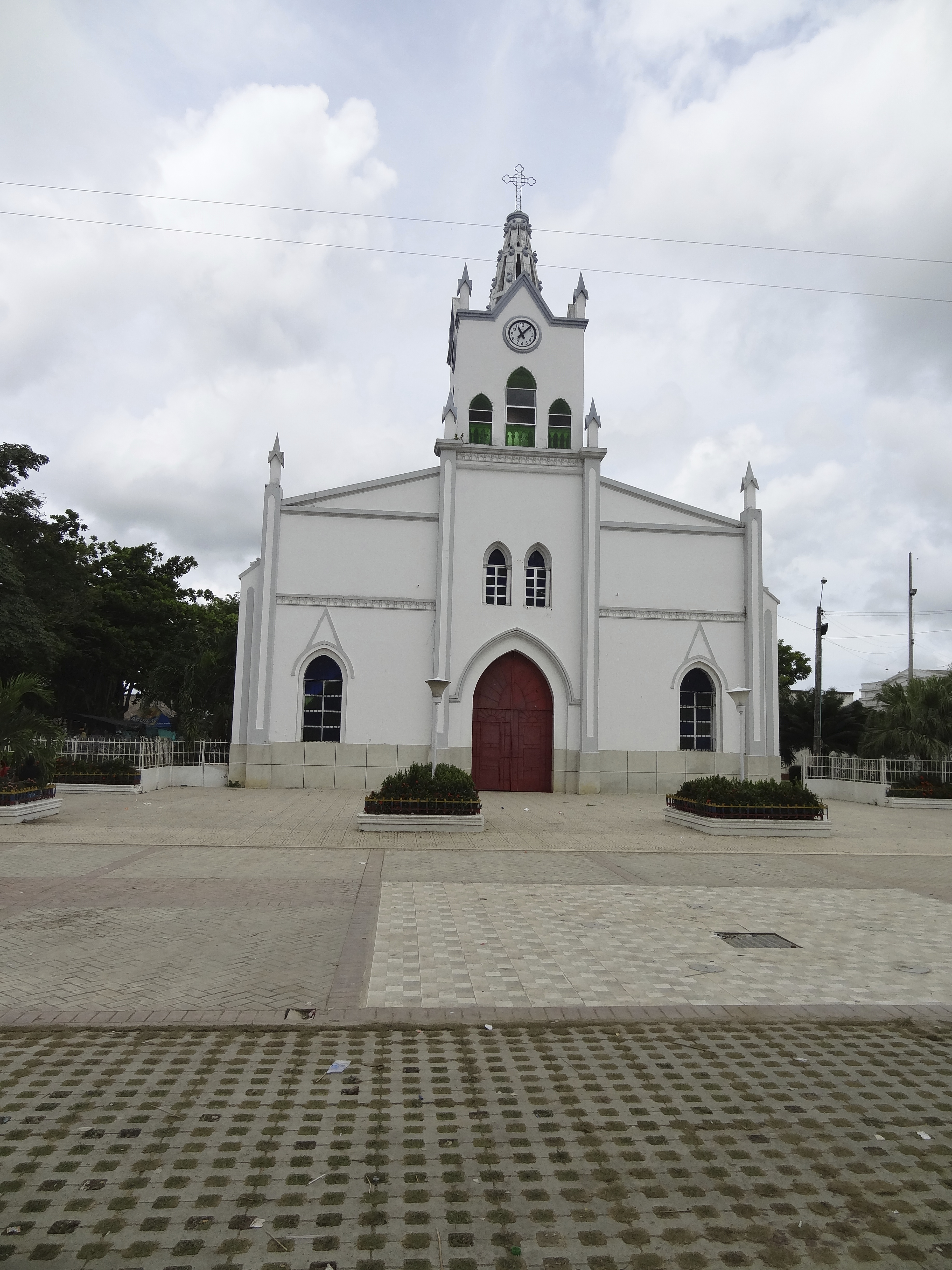 AL INTERIOR SE ENCUENTRA LA REPLICA DEL SANTO ESPAÑOL SAN JUAN PELAYO